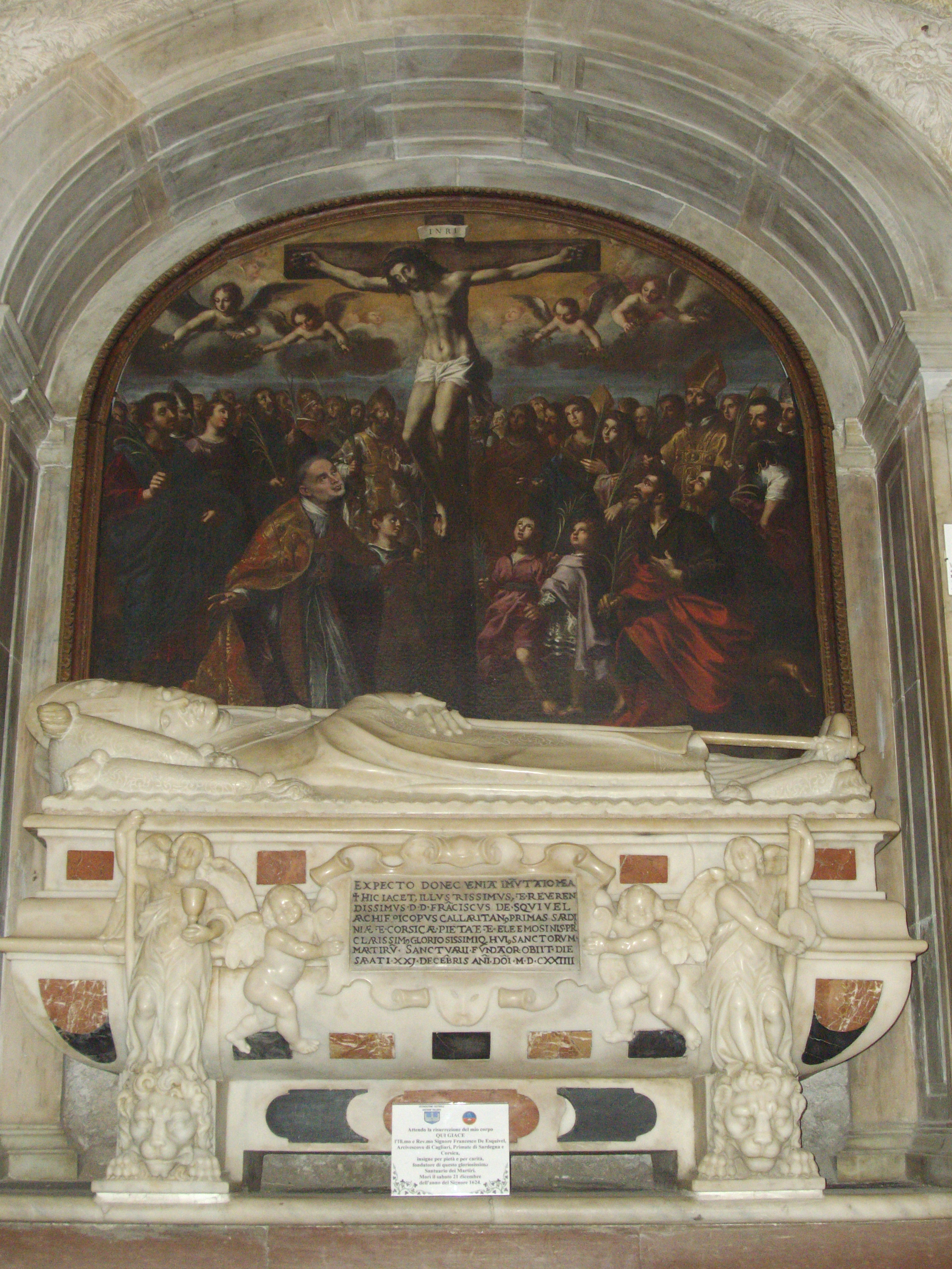 Sarcofago dell'arcivescovo Francisco d'Esquivel nel vestibolo del Santuario dei Martiri - Cattedrale di Cagliari